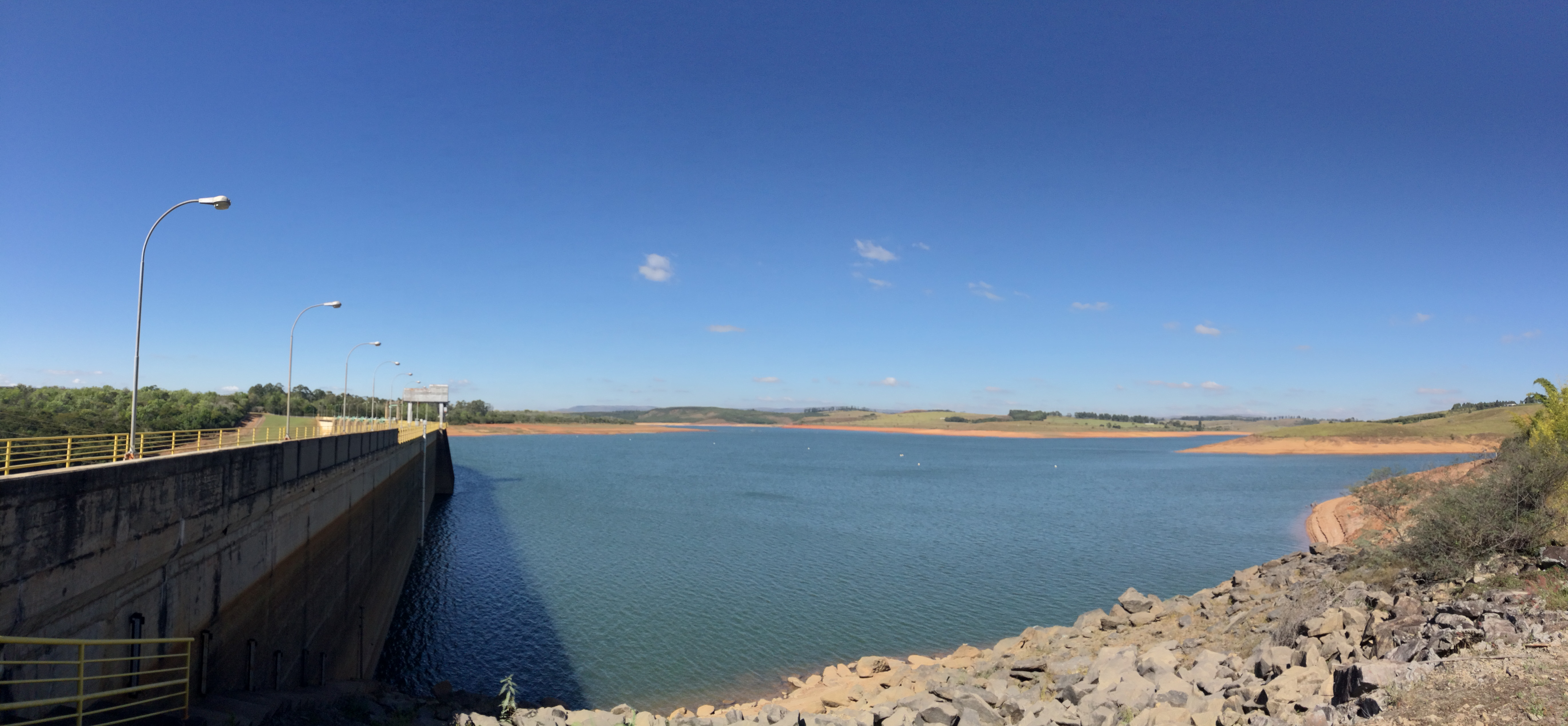 Represa de Camargos - MG